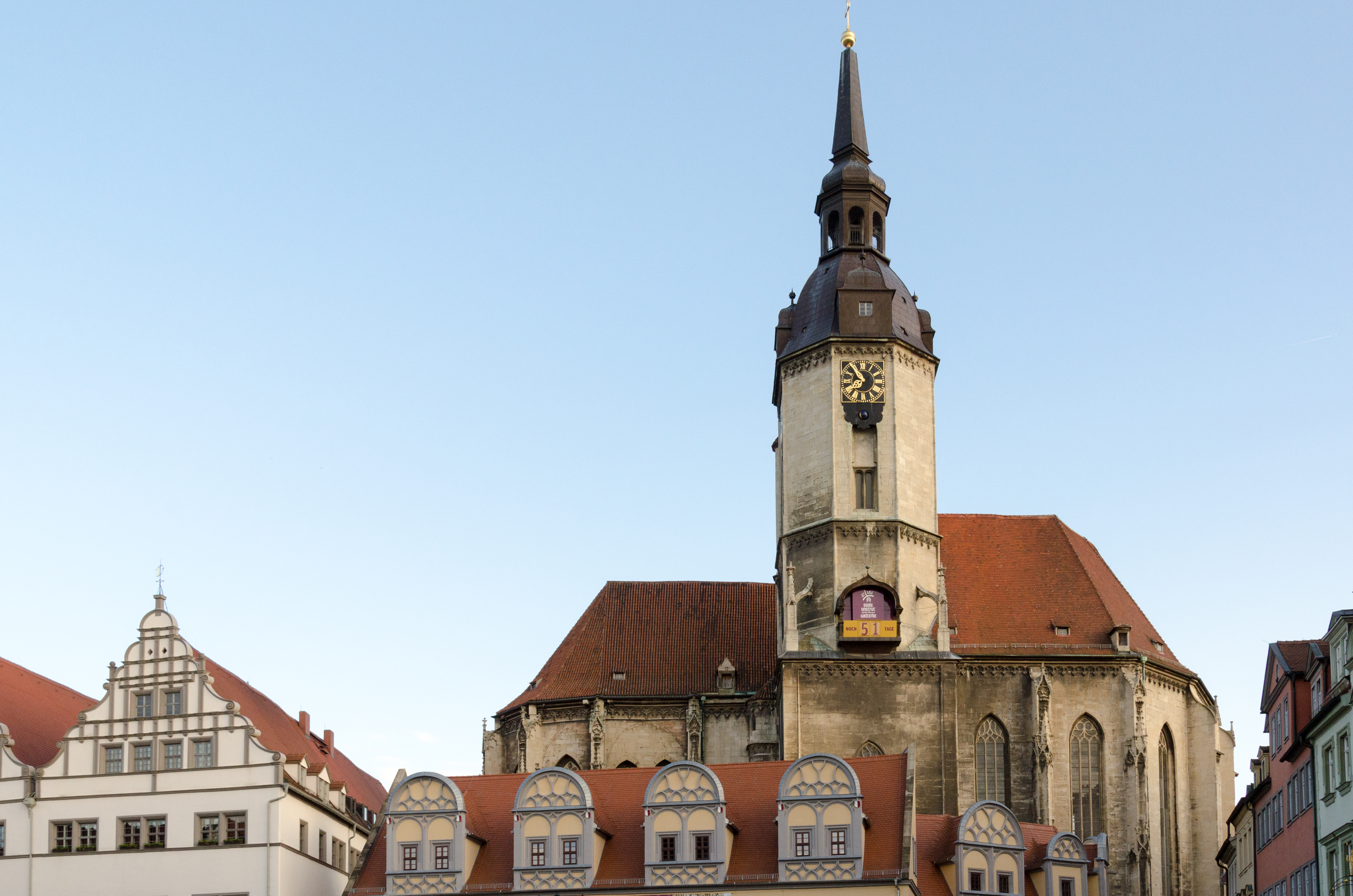 Naumburg, Stadtpfarrkirche St. Wenzel